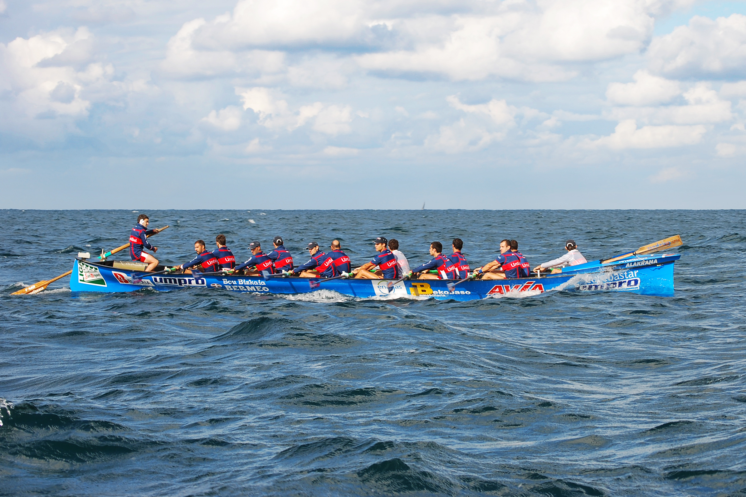 Trainière Bou Bizkaia lors du Drapeau de Zarautz (2010).